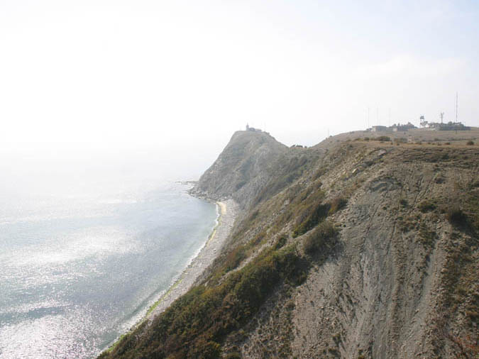 Cape Emine, in Bulgaria.